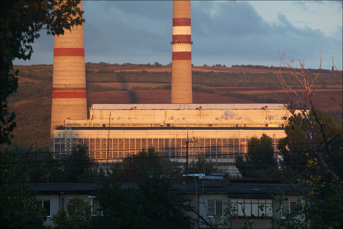 Кишинёвская ТЭЦ-2, вид на главный корпус и дымовые трубы